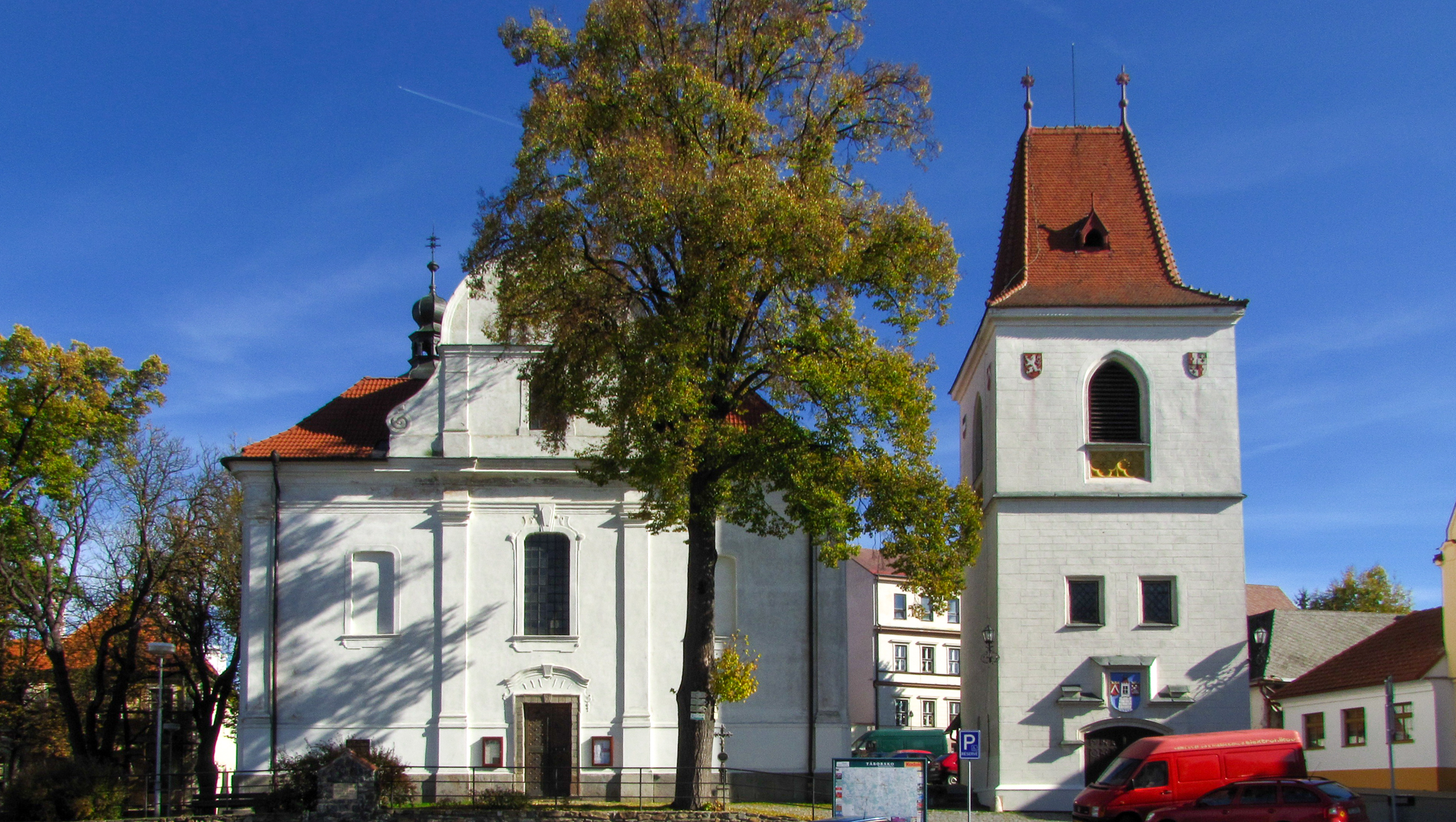 Kostel sv. Martina (Mladá Vožice), Mladá Vožice